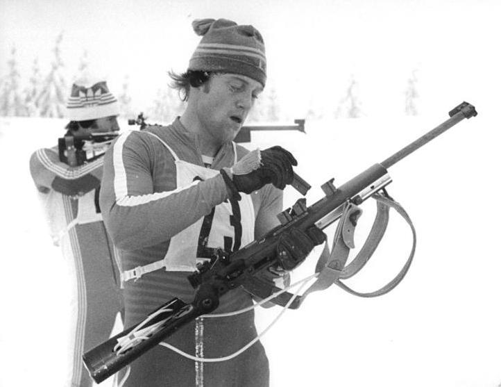 Klaus Siebert, Frank Ullrich ADN-ZB Schaar 17-2-78 Oberhof: DDR-Meisterschaften im Biathlon- Mit deutlichem Vorsprung erkämpfte sich am 16.2.78 der Zinnwalder Klaus Siebert (vorn) den Meistertitel im 20-km-Einzelwettbewerb. Seine Zeit: 1:11:52,10 Std. (1 Strafminute). Frank Ullrich (ASK Oberhof- dahinter) wurde in 1:15:16,84 st Vierter.